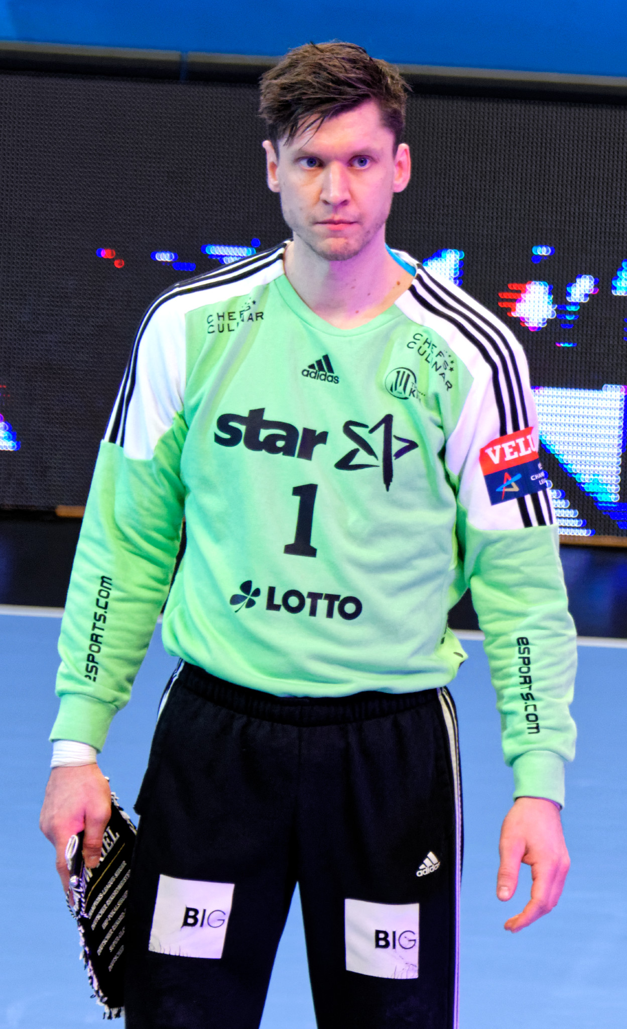 Rencontre de phase de groupe de la ligue des champions 2017/18 entre le PSG et Kiel. A Coubertin, le 4 mars 2018.